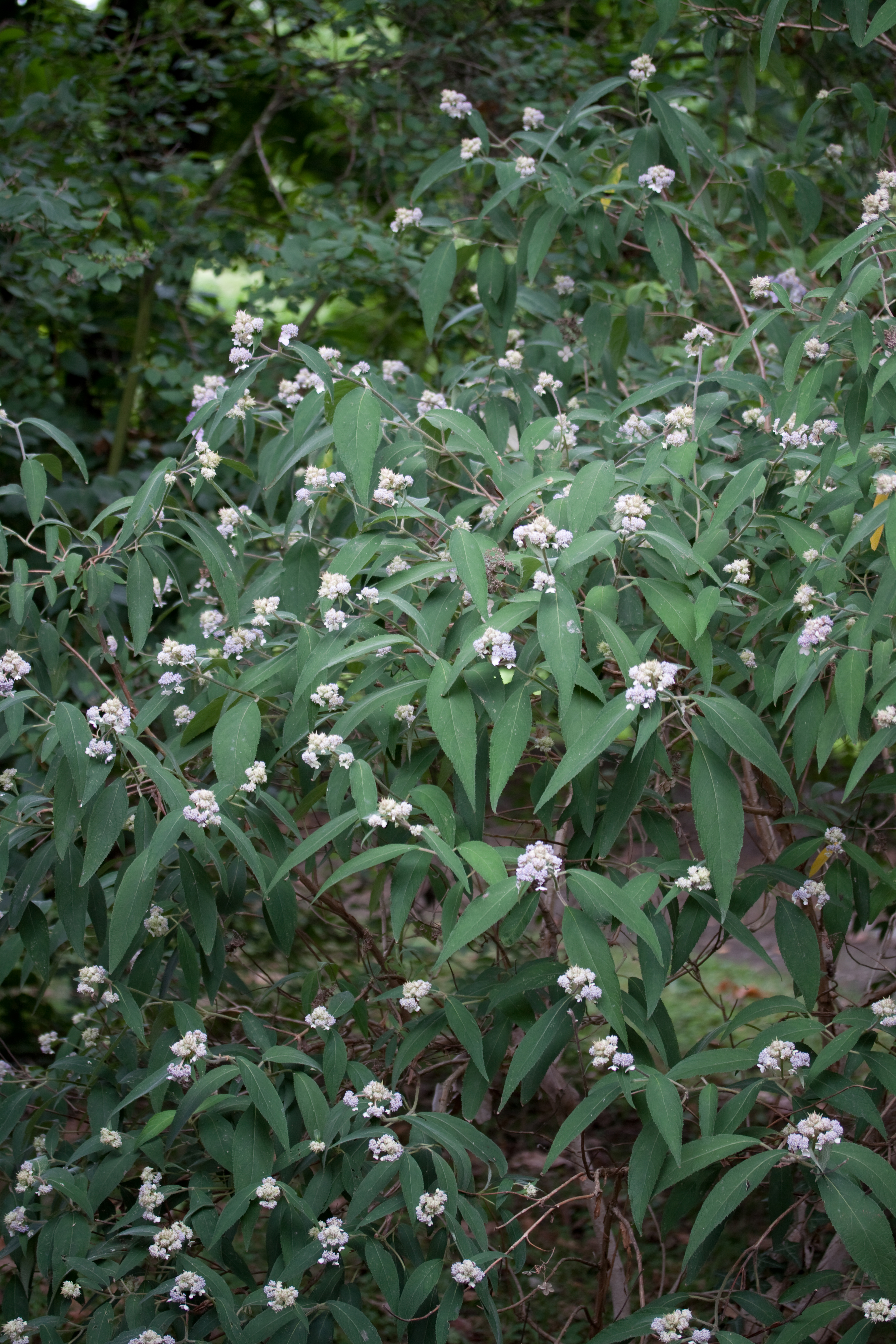 Floraison d'Hydrangea involucrata - Jardin botanique de Strasbourg